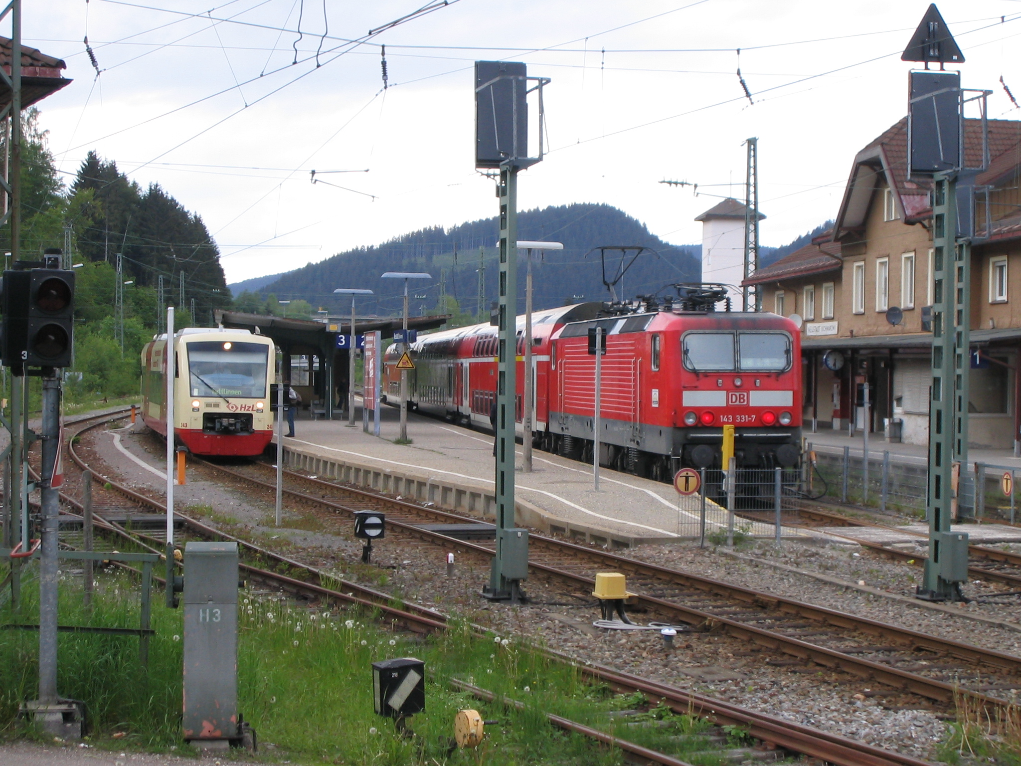 Höllentalbahn: Regionalbahn aus Freiburg trifft Ringzug am Bahnhof Neustadt (Schwarzwald)